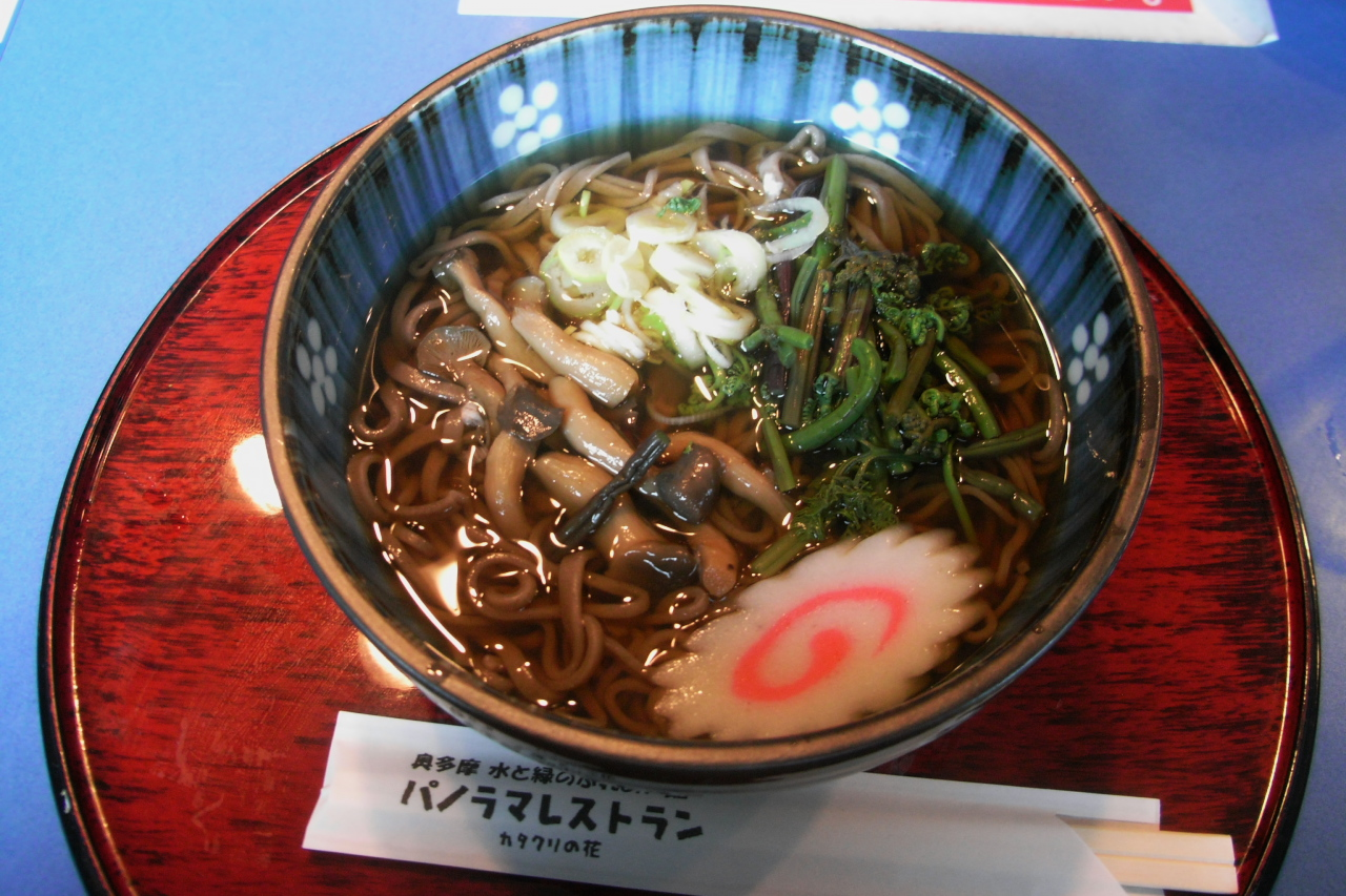 奥多摩湖のパノラマレストランで食べた山菜そば。